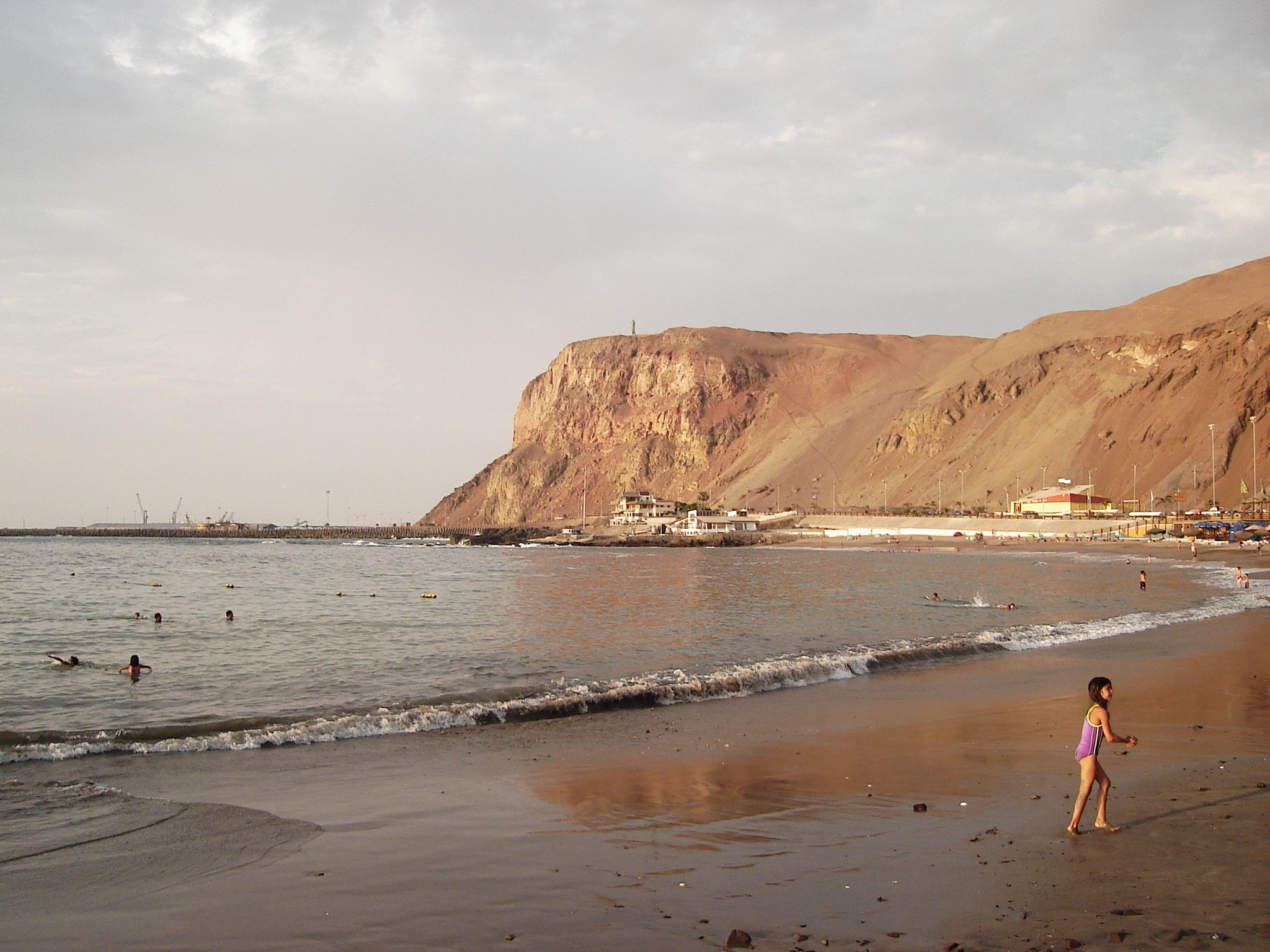 Foto tirada por mim, em Arica.